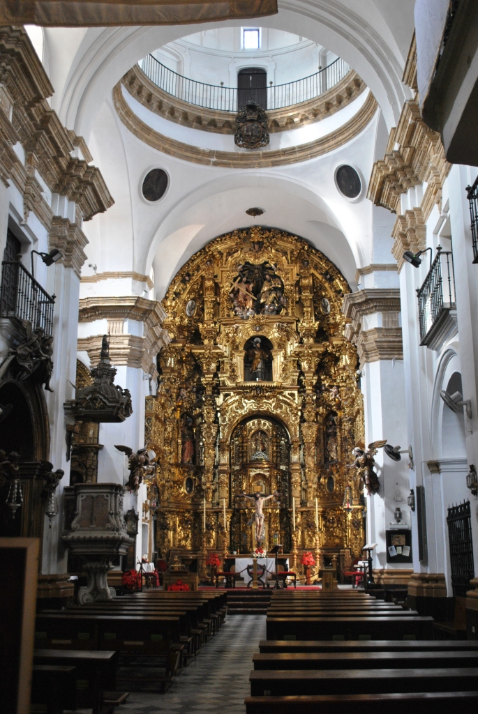 Cádiz